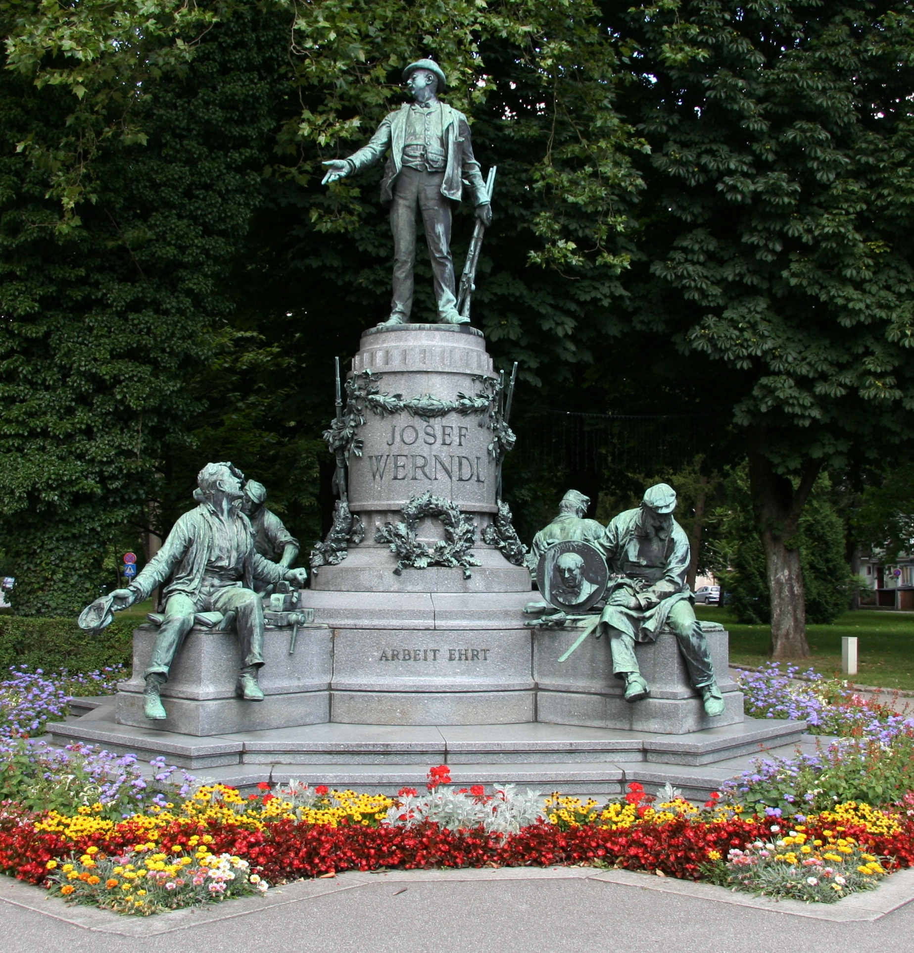 Josef Werndl-Denkmal in Steyr; Bildhauer: Viktor Tilgner